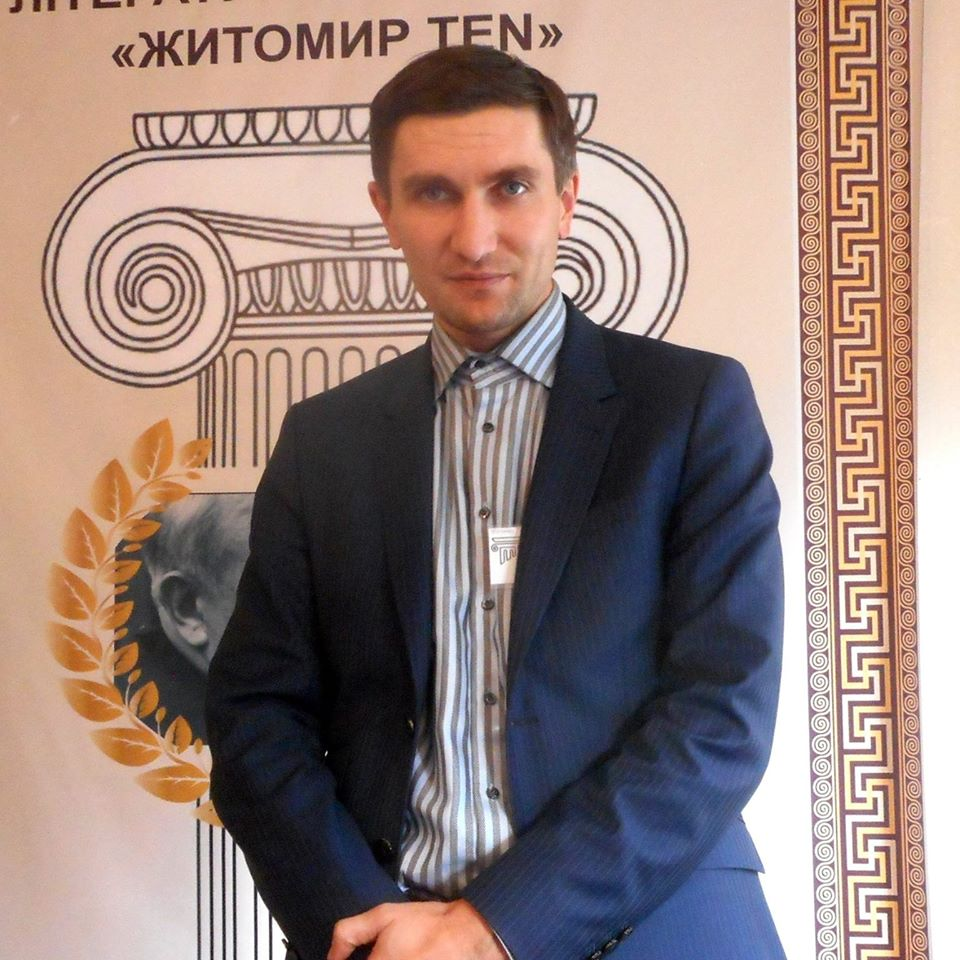 Український поет Сергій Сіваченко